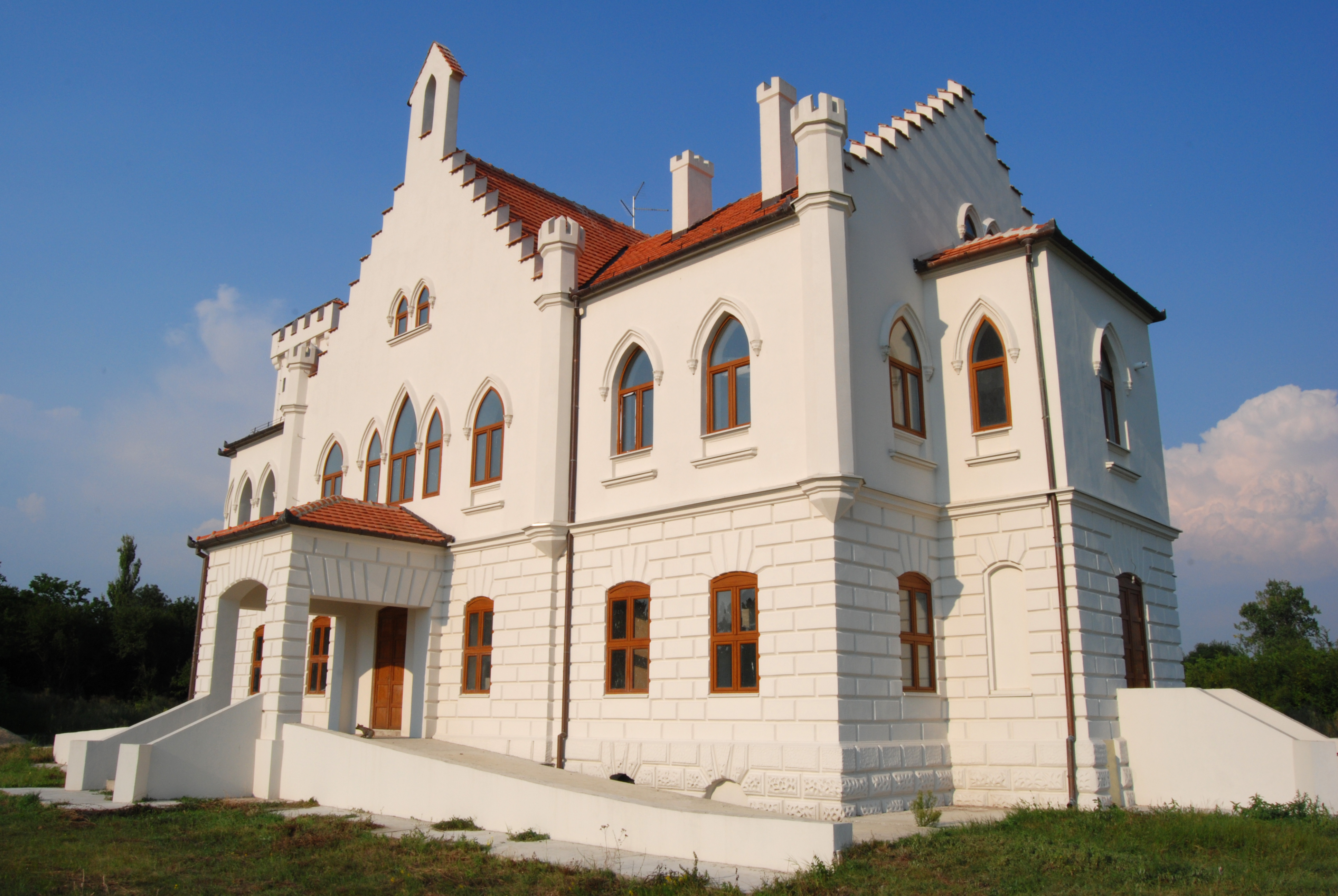 Дворац Капетаново код Старог Леца